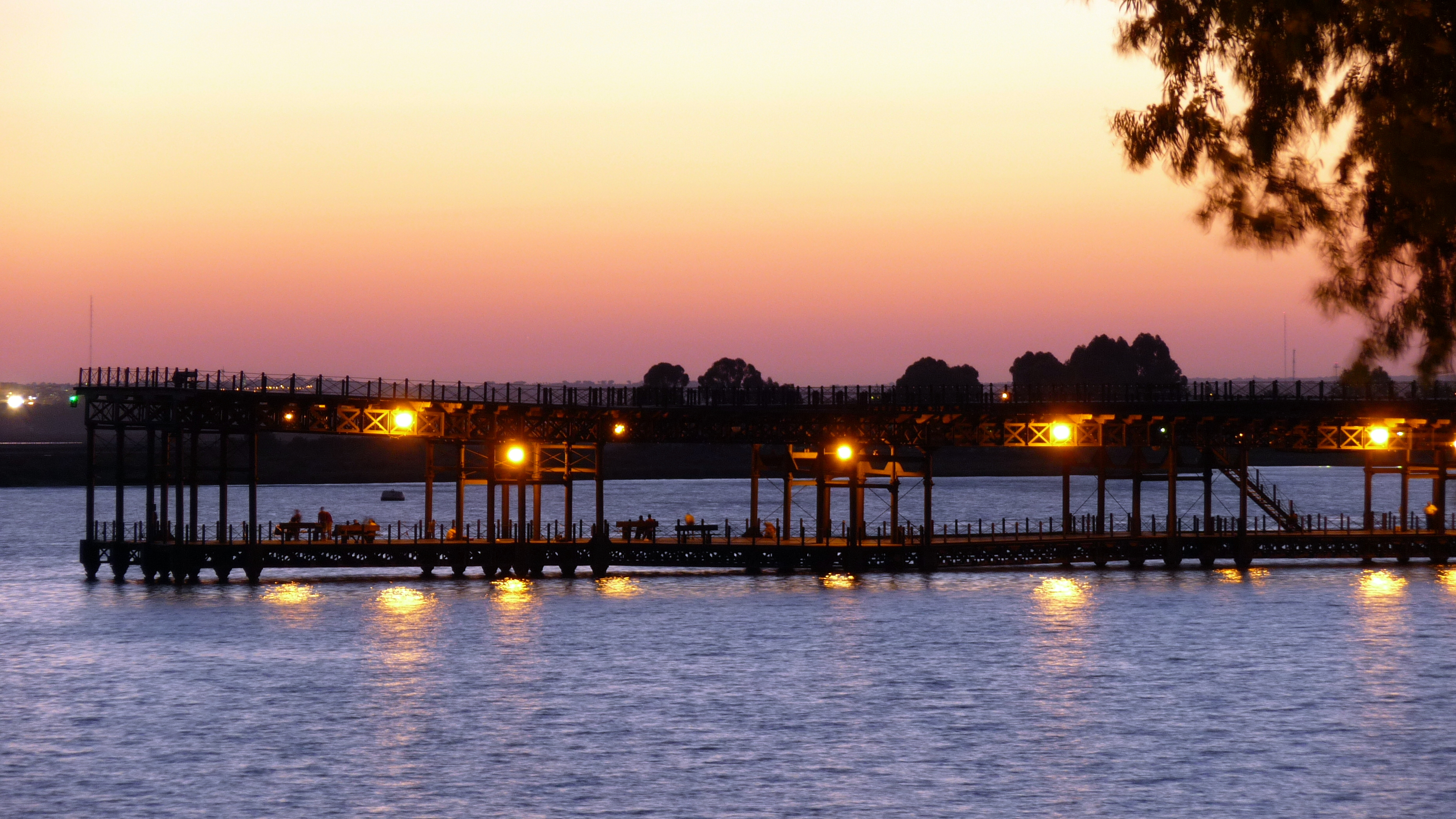 "Muelle de mineral de la compañía Riotinto", en la ciudad de Huelva, España.